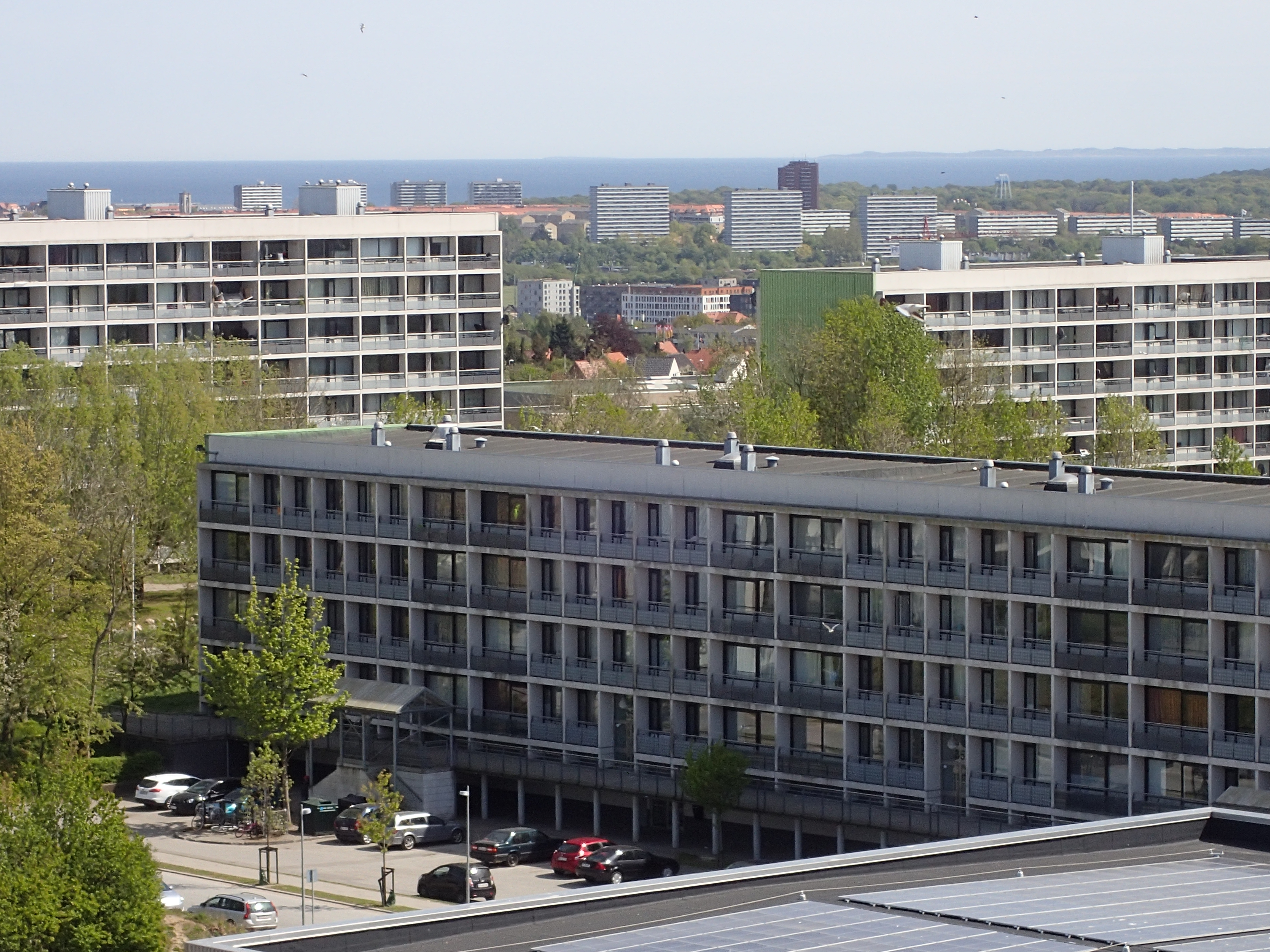 Gellerupparken, udsyn mod sydøst.